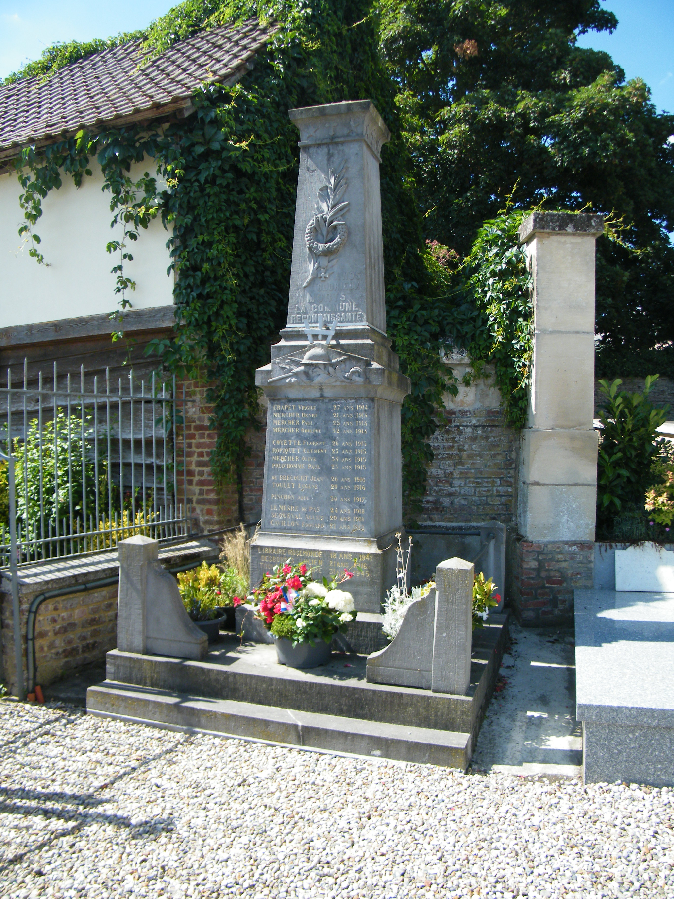 Cocquerel (Somme, France), monument aux morts pour la patrie.